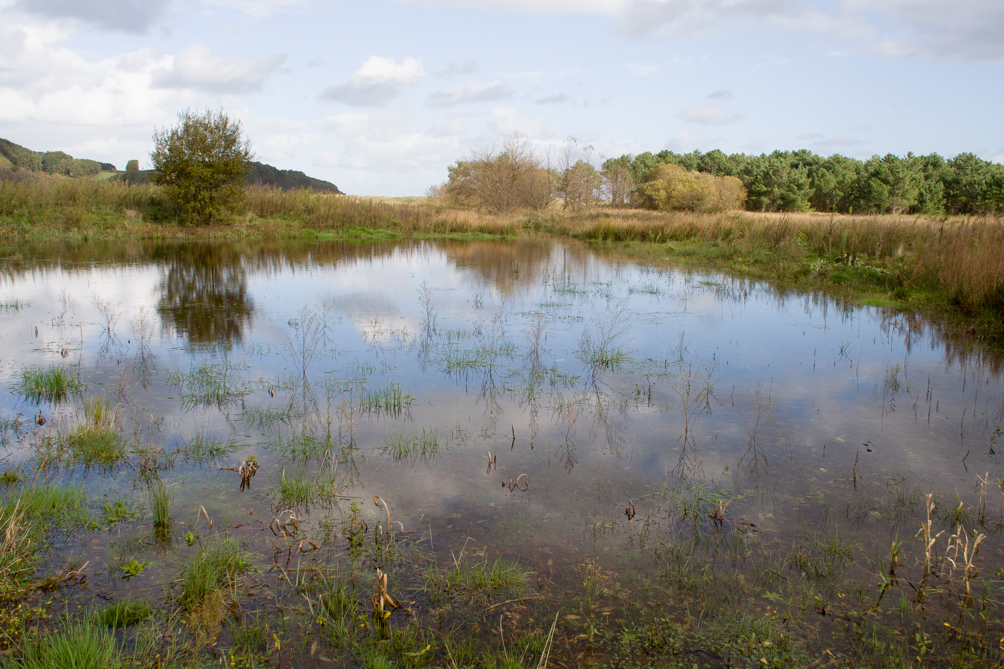 Ortigueira-Mera Laguna litoral de San Martiño, cuyos trabajos de recuperación y regeneración del borde litoral merecieron el premio San Telmo en el año 2007 This is a photography of a Site of Community Importance in Spain with the ID: ES1110001. Natura2000 entry, EEA entry